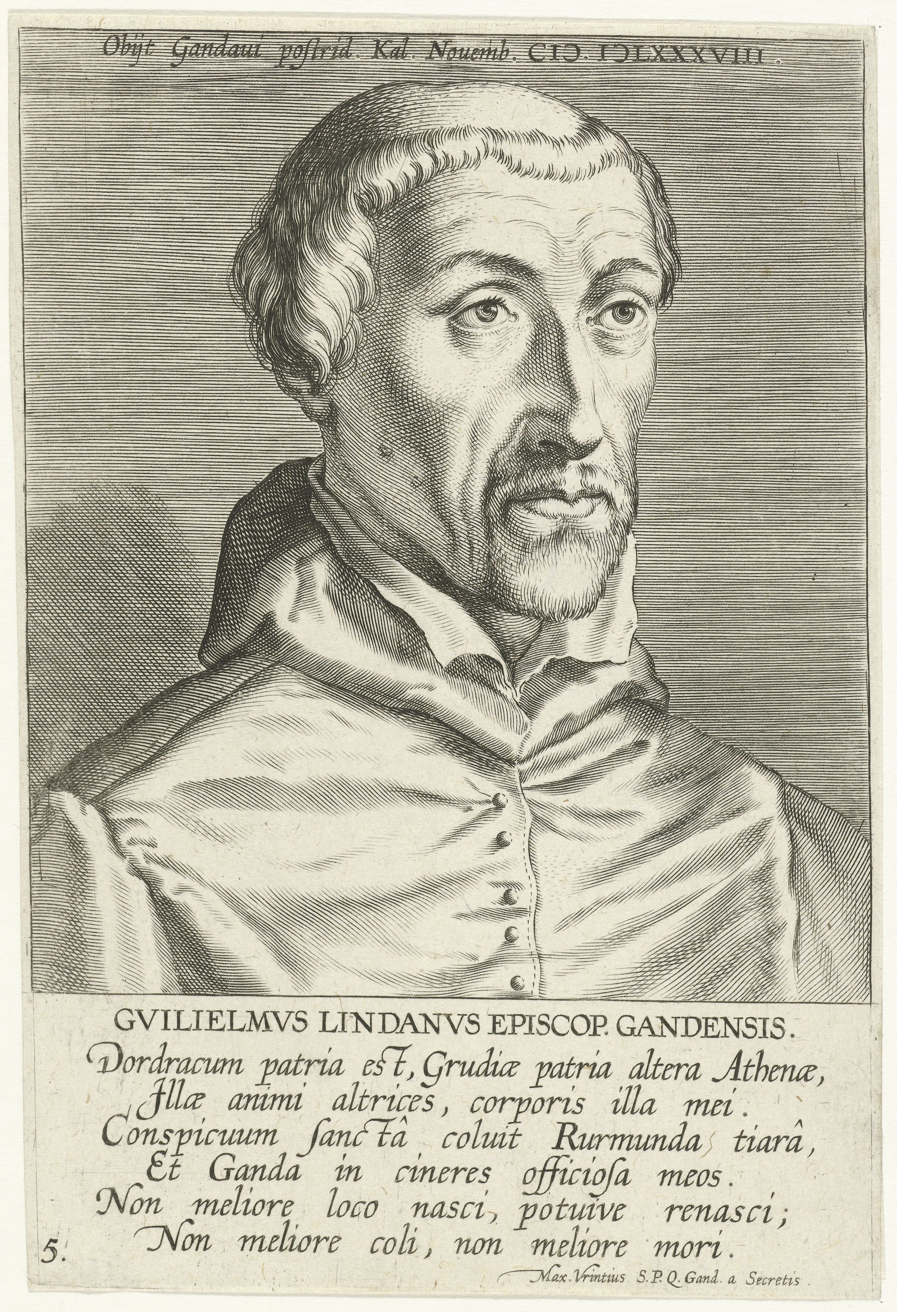 IdentificatieTitel(s): Portret van Willem van der LindenGvilielmvs Lindanvs Episcop Gandensis (titel op object)Portretten van beroemde Nederlandse en Vlaamse geleerden (serietitel)Illustrium Galliae Belgicae scriptorum icones et elogi (serietitel)Objecttype: prent Serienummer: 5/51Objectnummer: RP-P-1906-676Catalogusreferentie: New Hollstein Dutch fig. 31-1(2)Opschriften / Merken: verzamelaarsmerk, verso midden onder, gestempeld: Lugt 2228Omschrijving: Portret van Willem van der Linden, bisschop van Gent. Buste naar rechts. Boven het portret rechts het wapenschild van Adrianus VI. De prent heeft een Latijns boven- en onderschrift en maakt deel uit van een serie van beroemde Nederlandse en Vlaamse geleerden.VervaardigingVervaardiger: prentmaker: Philips Galle (toegeschreven aan atelier van)schrijver: Maximiliaan Vrients (vermeld op object)uitgever: Theodoor Galle (mogelijk)Plaats vervaardiging: AntwerpenDatering: 1604 - 1608Fysieke kenmerken: gravureMateriaal: papier Techniek: graveren (drukprocedé)Afmetingen: blad: b 116 mm × h 172 mmOnderwerpWie: Willem Damaszoon van der LindtVerwerving en rechtenVerwerving: aankoop 1906Copyright: Publiek domein